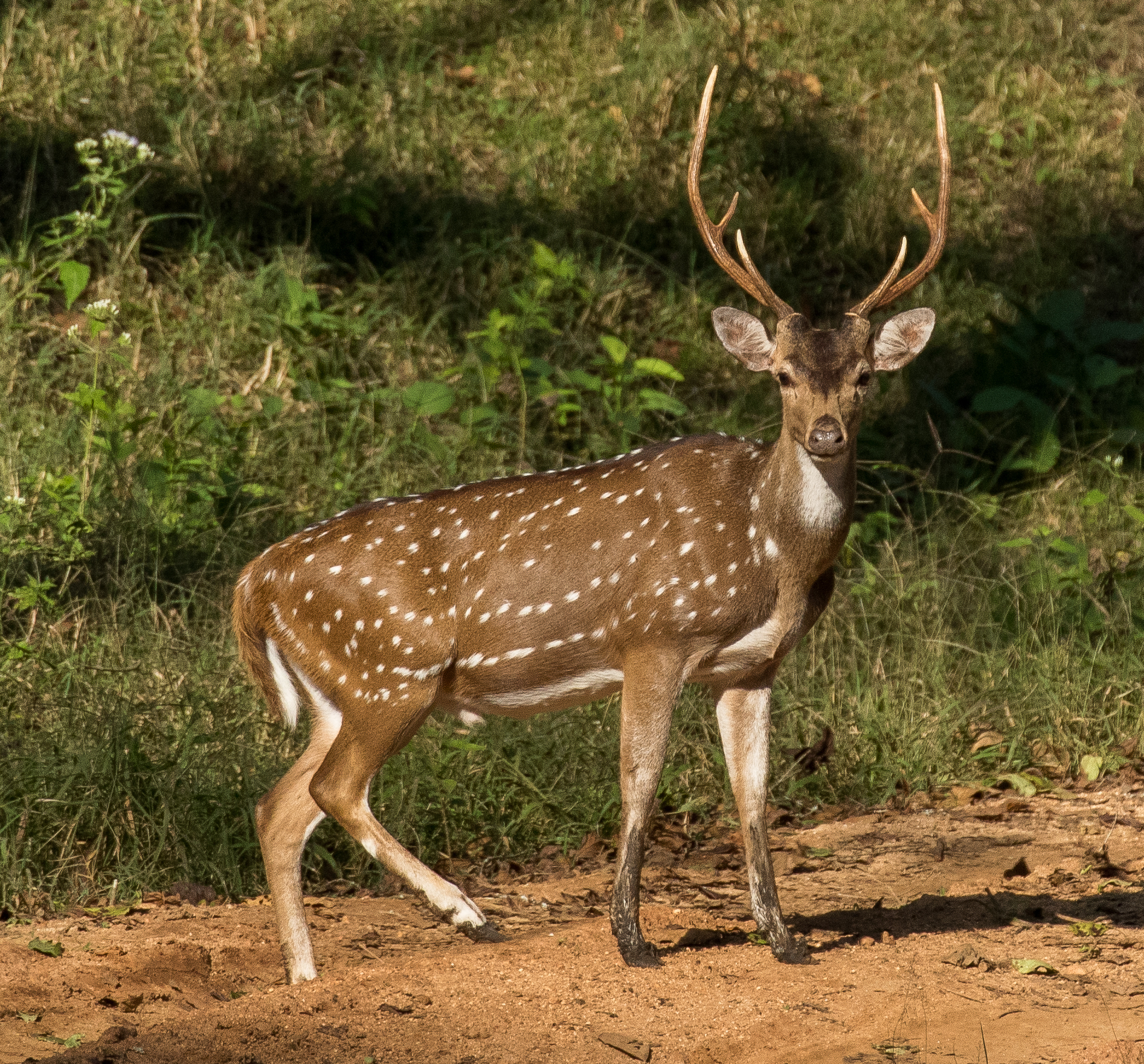 Spotted Deer - Nagarhole NP - Karnataka CD5A8440